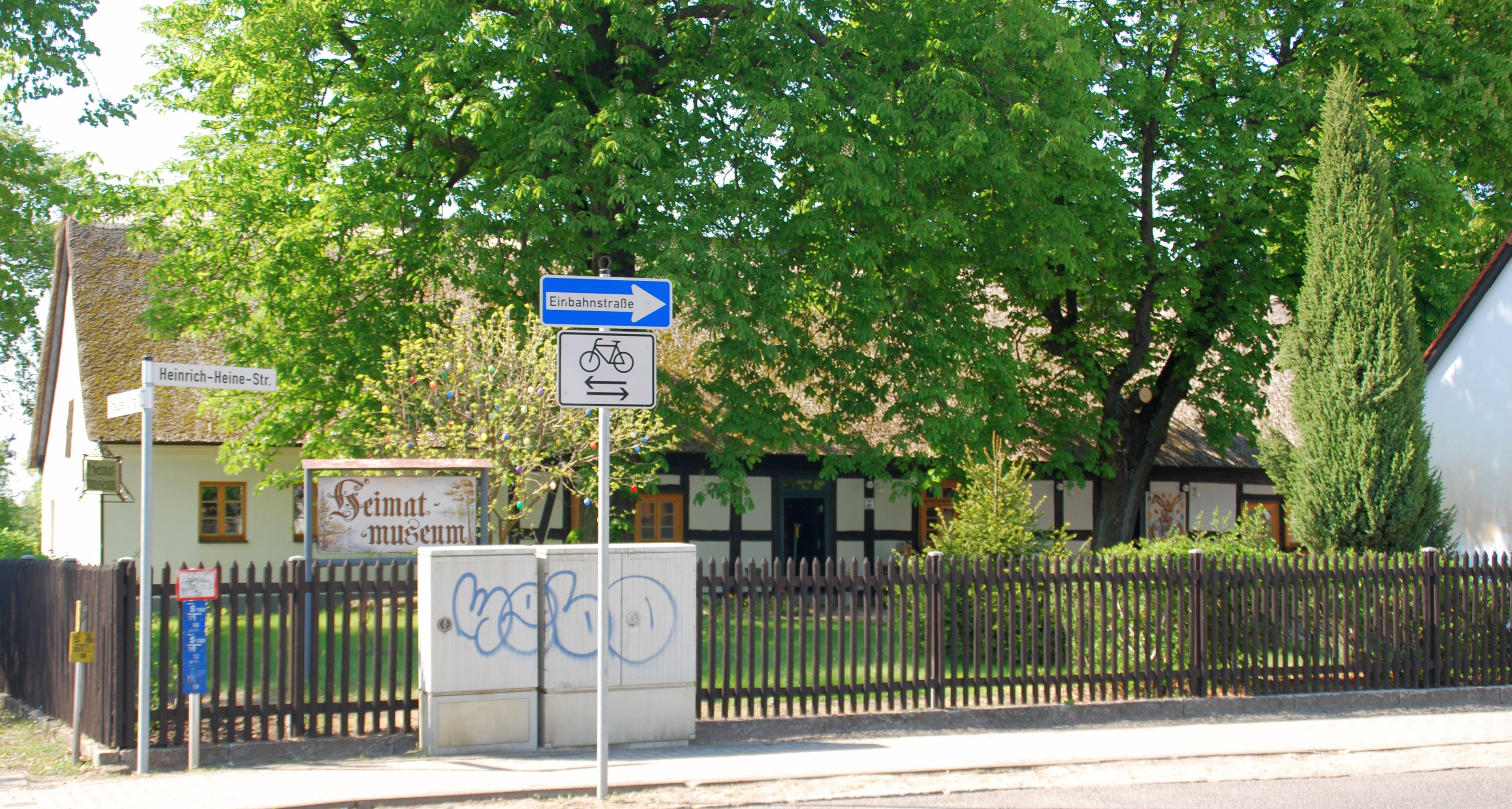 Kolonistenhaus (heute Heimatmuseum). Das Haus stammt aus dem Jahr 1760 und hat ein Reetdach.